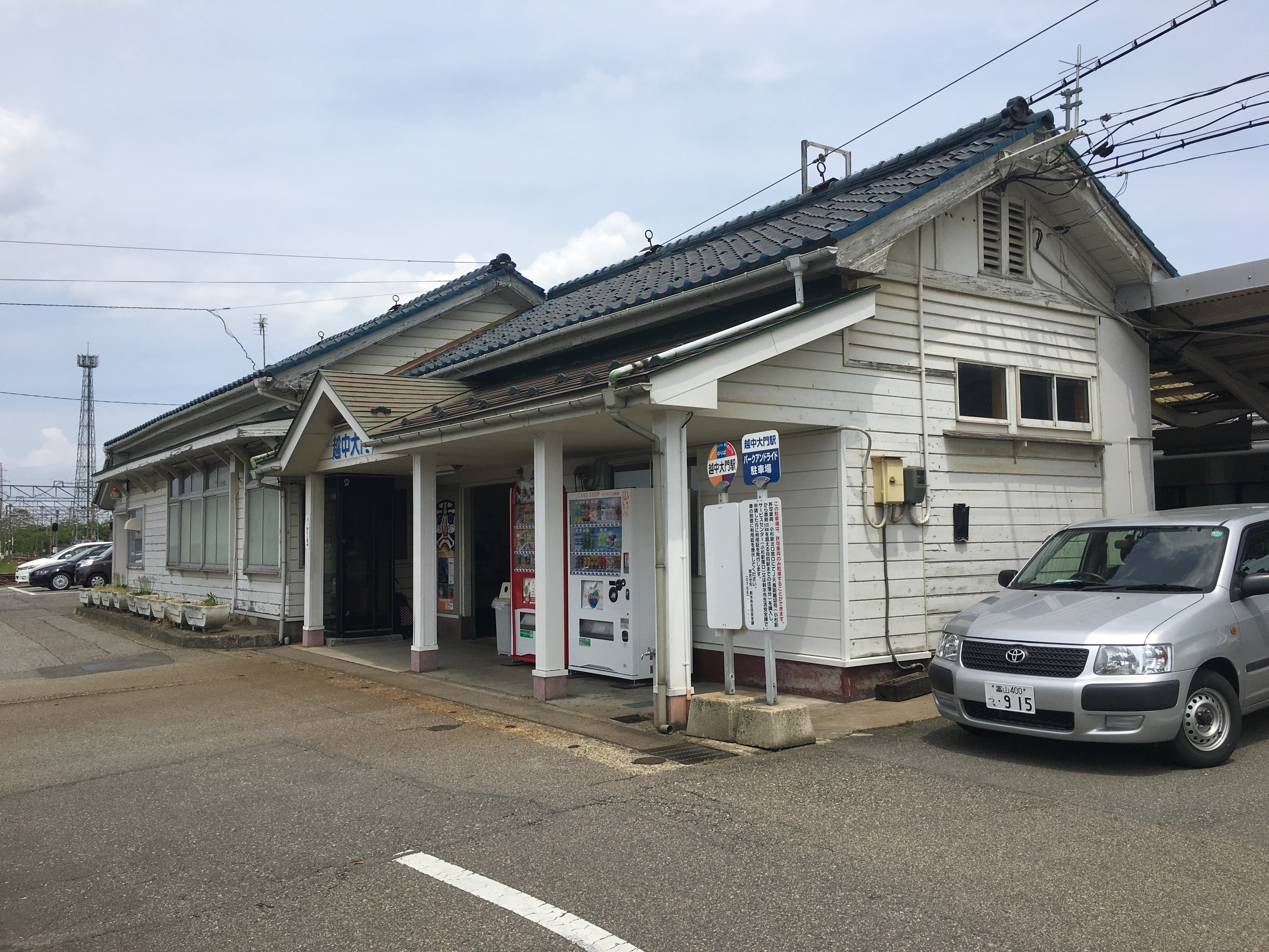 あいの風とやま鉄道越中大門駅駅舎